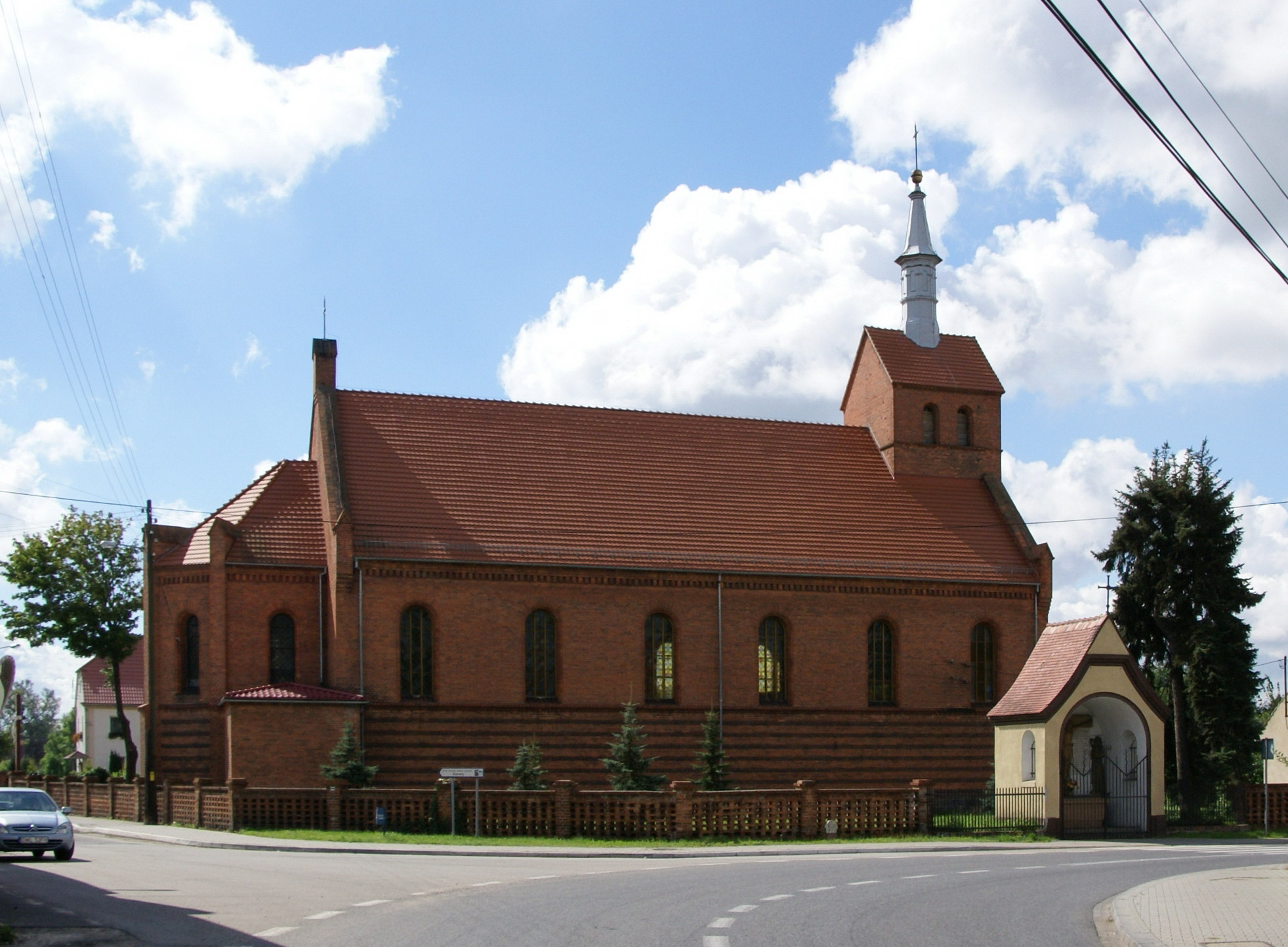 Krzelów Nr 35 - kościół parafialny pw. św. Marcina (zabytek nr 142/A/02 z 4.12.2002)